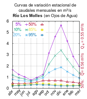 Curvas de variación estacional del río Los Molles en Ojos de Agua. # Dirección General de Aguas # Ministerio de Obras Públicas (Chile) # Diagnóstico y clasificación de los cursos y cuerpos de agua según objetivos de calidad. Cuenca del río Limarí # Santiago de Chile # Ministerio de Obras Públicas (Chile) # 2004 # url: # urlarchivo: # Tabla 4.3 pág. 47 mes 5% 10% 20% 50% 85% 95% abr 1.669 1.191 0.812 0.438 0.265 0.225 may 1.235 0.941 0.693 0.427 0.286 0.248 jun 1.023 0.834 0.663 0.453 0.320 0.277 jul 0.752 0.671 0.587 0.460 0.347 0.296 ago 0.975 0.860 0.741 0.561 0.401 0.328 sep 1.253 1.108 0.946 0.680 0.428 0.315 oct 3.156 2.160 1.399 0.686 0.383 0.317 nov 4.612 2.918 1.713 0.697 0.330 0.261 dic 5.637 3.411 1.892 0.689 0.294 0.227 ene 4.228 2.612 1.492 0.583 0.274 0.220 feb 2.843 1.899 1.192 0.548 0.286 0.231 mar 1.926 1.360 0.915 0.480 0.284 0.238 This plot was created with Gnuplot.